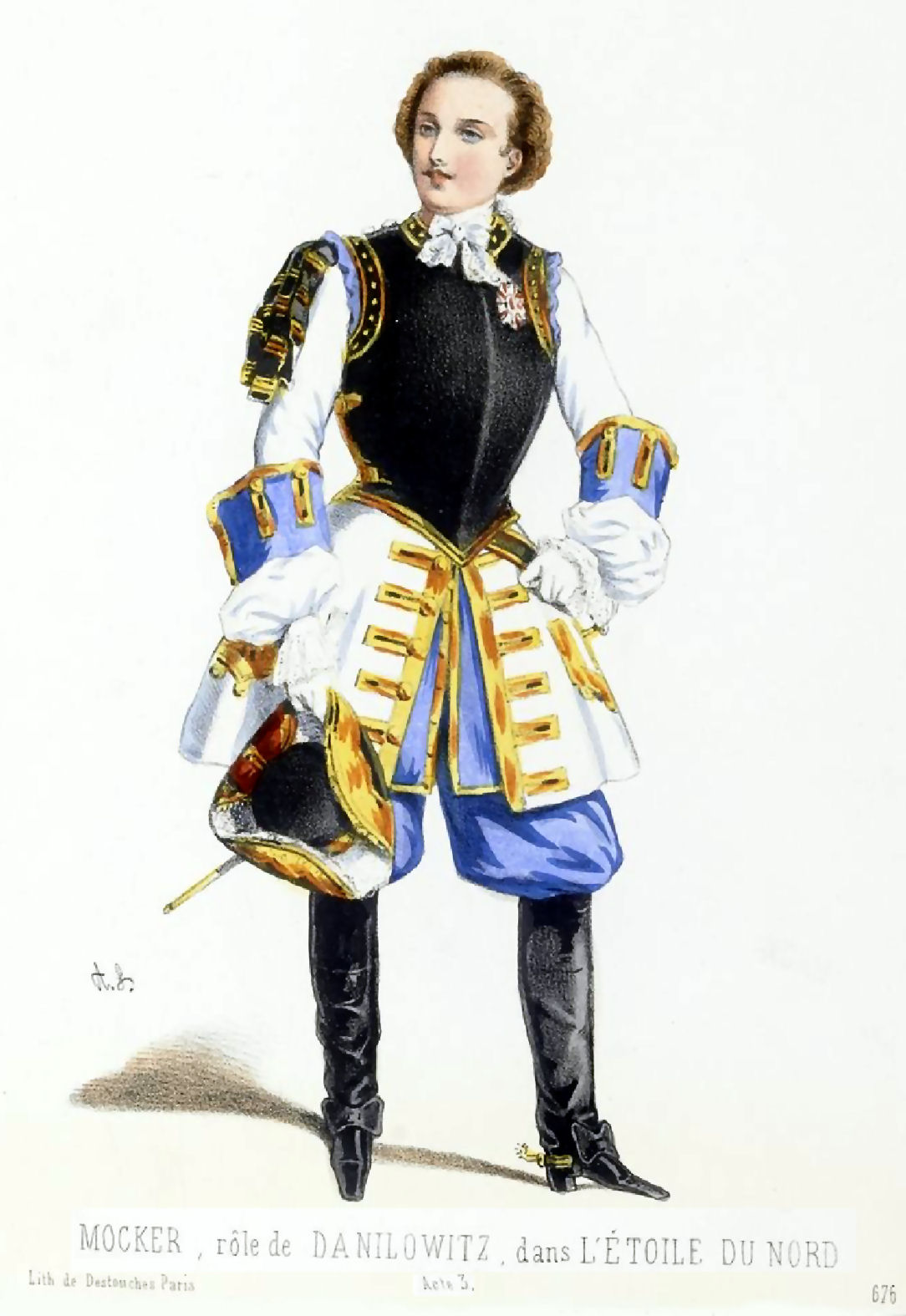 Mocker, rôle de Danilowitz, dans L ' étoile du nord , acte 3 (lithographie d'Alexandre Lacauchie)